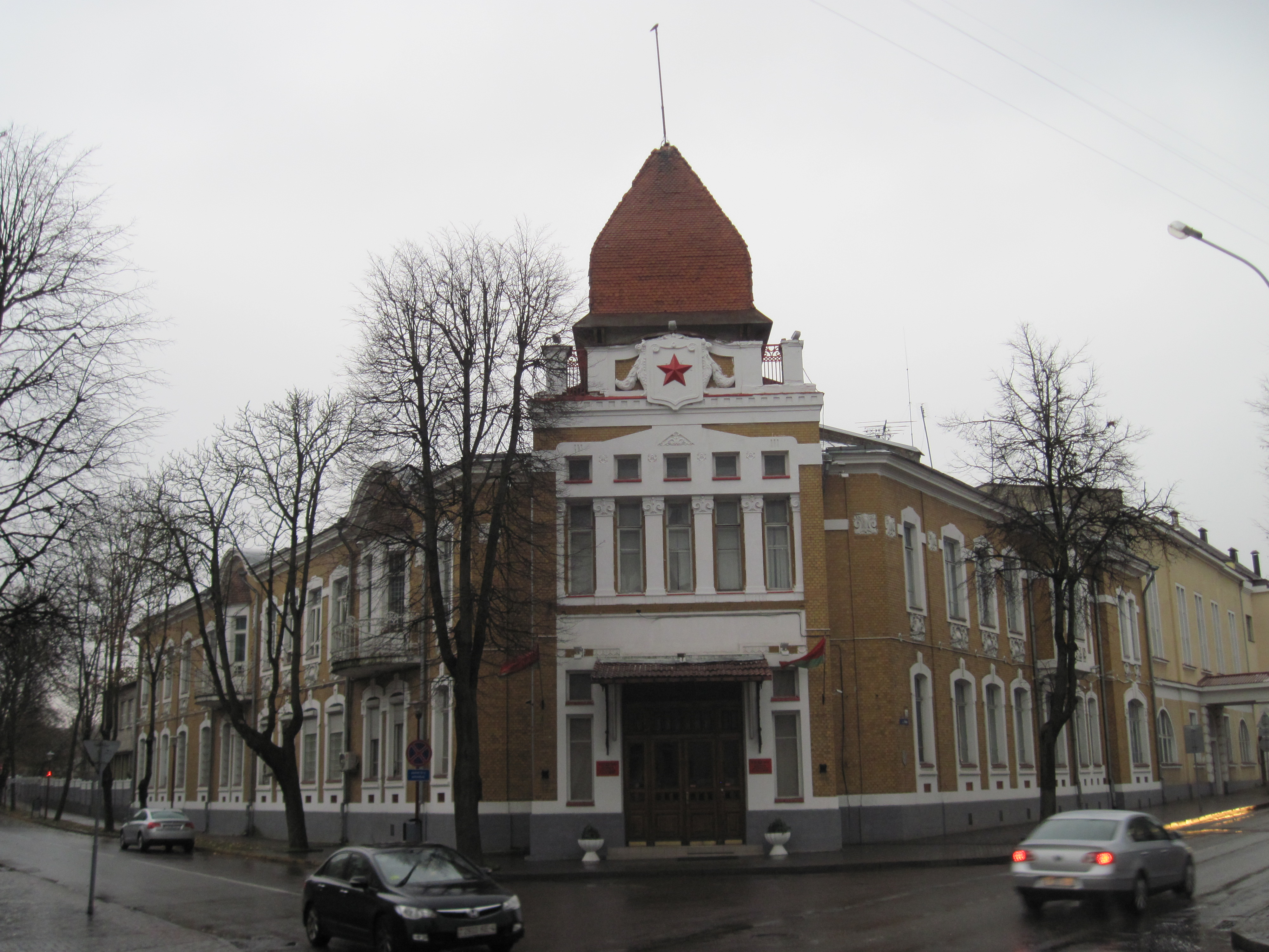 Будынак былога пазямельнага банка. Гродна, вул. Леніна, 9